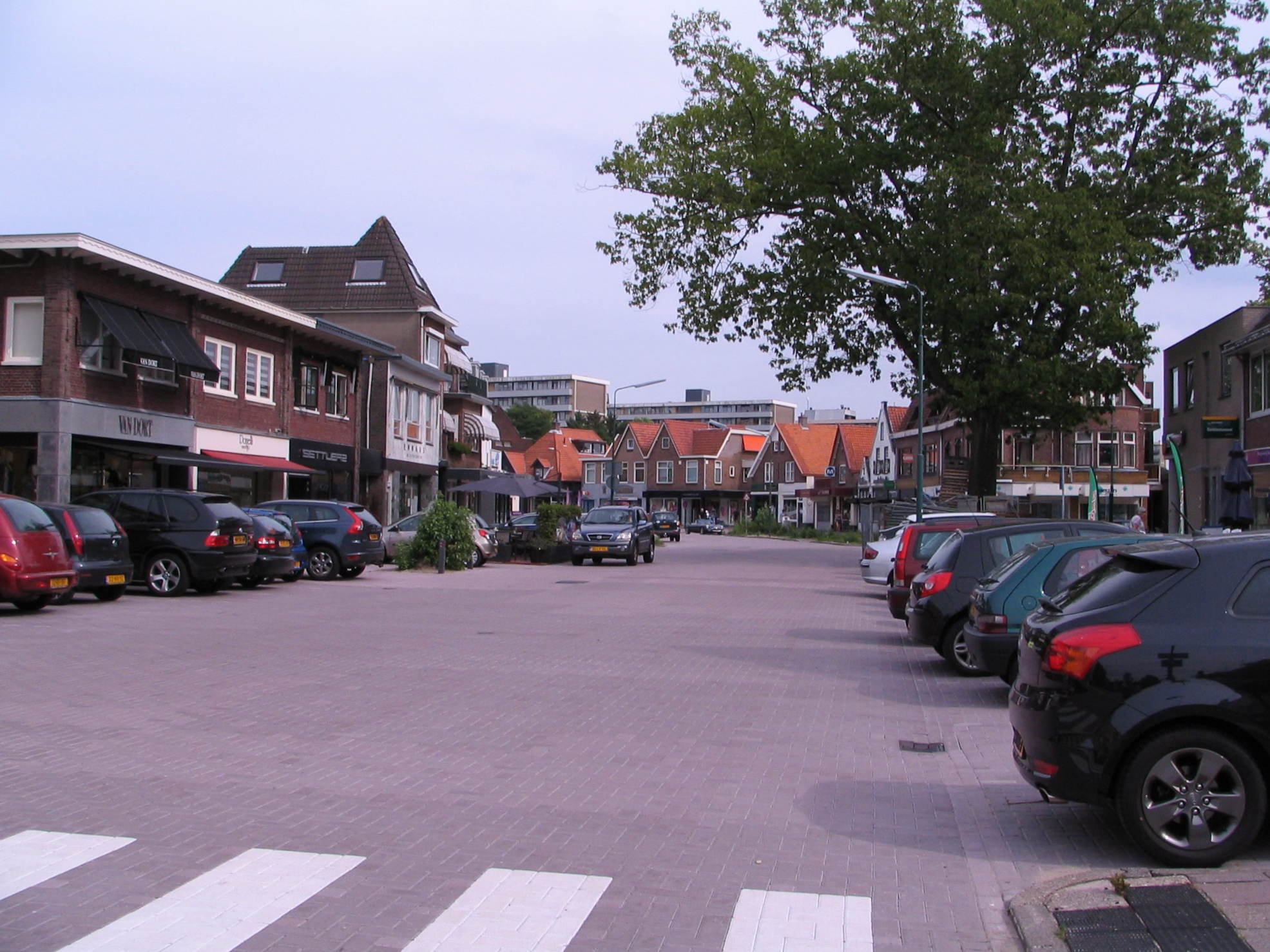 Julianalaan Bilthoven (gemeente De Bilt). Datering: augustus 2012.